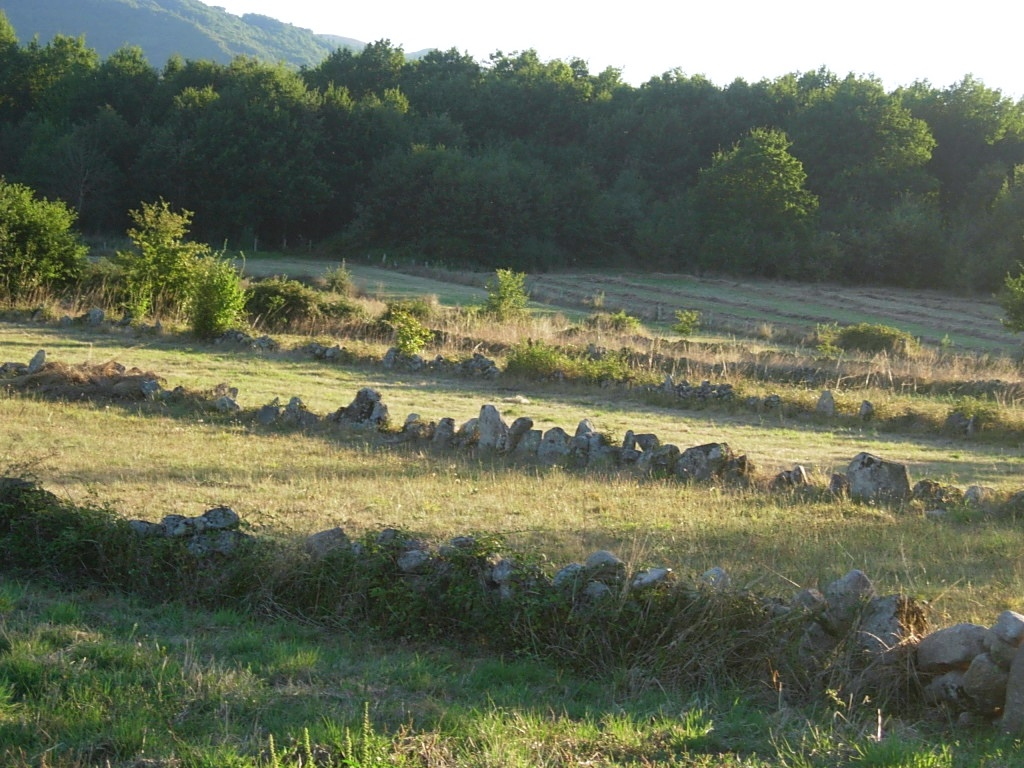 Bocage entre fincas; Paderne de Allariz, Orense, Galicia.